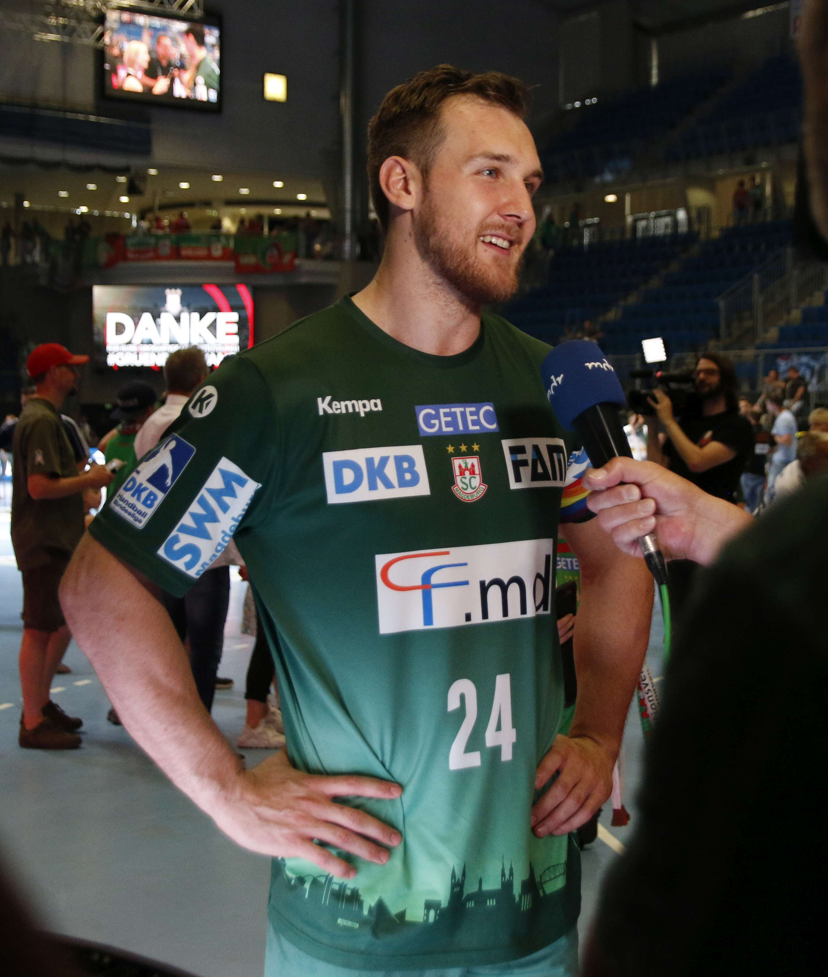 norvegischer Handballspieler Christian O´Sullivan